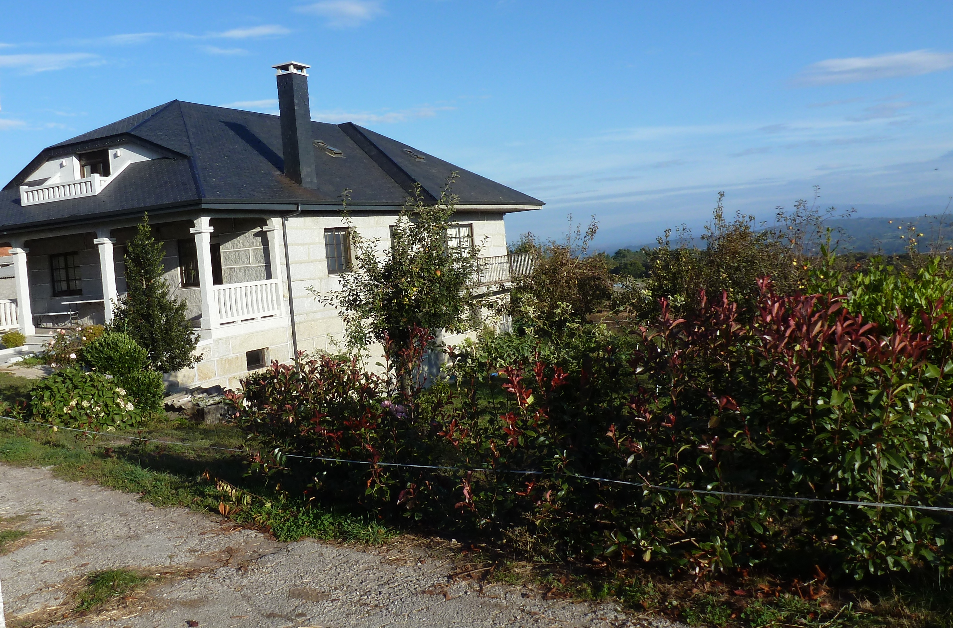 O Rañadoiro, Furco, Carballedo